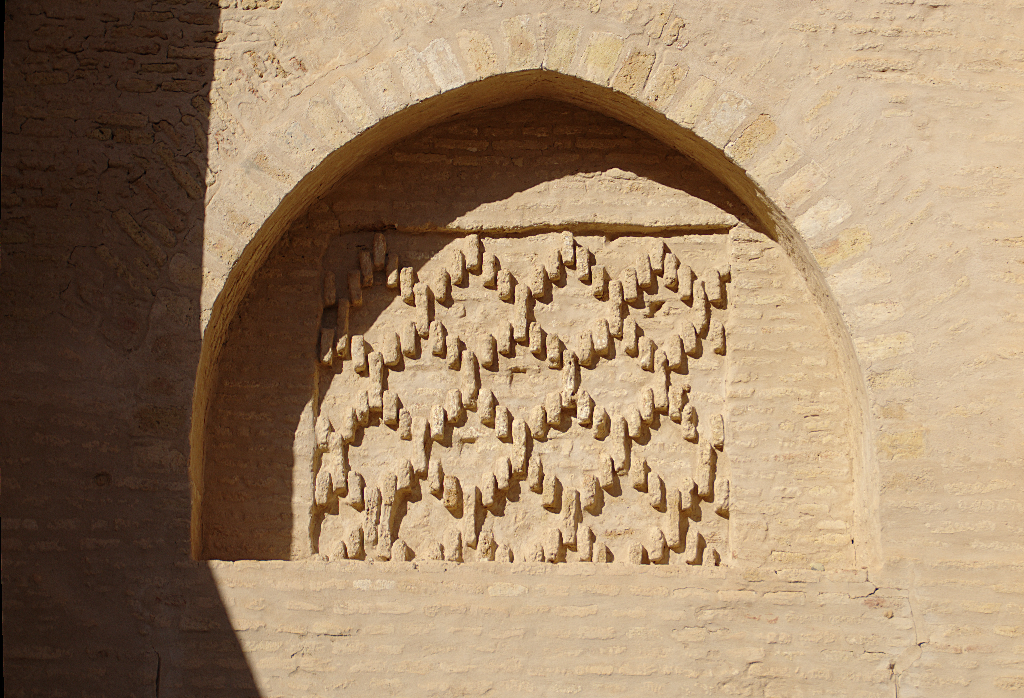 Grande Mosquée (Sidi Okba), Kairouan. Gros plan sur une niche en arc brisé de la façade occidentale. Le fond plat de la niche est orné d'un décor géométrique en briques cuites.